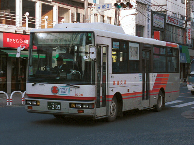 飯塚バスセンター前にて、撮影